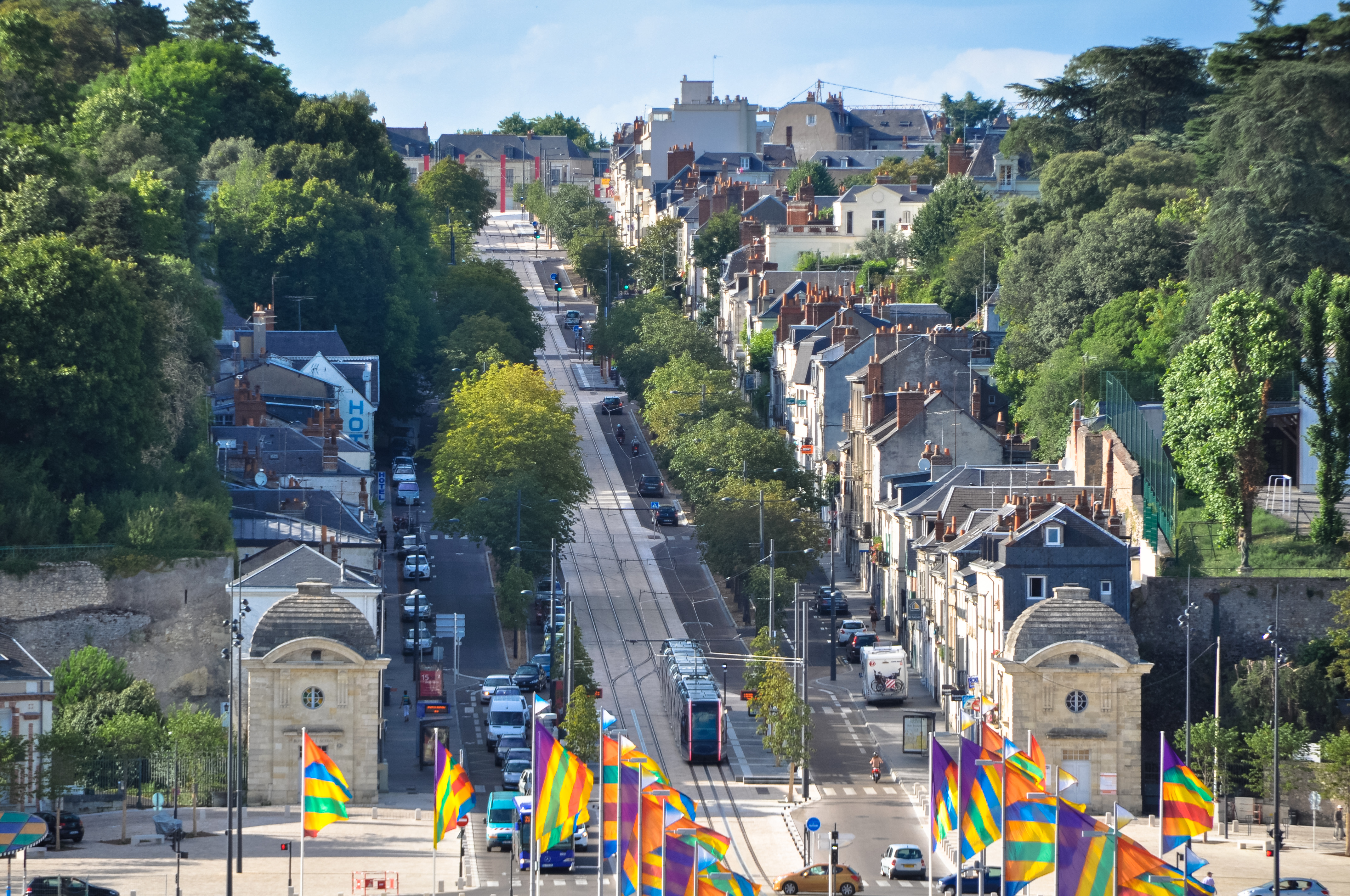 Avenue de la Tranchée à Tours, et octroi sur la place Choiseul